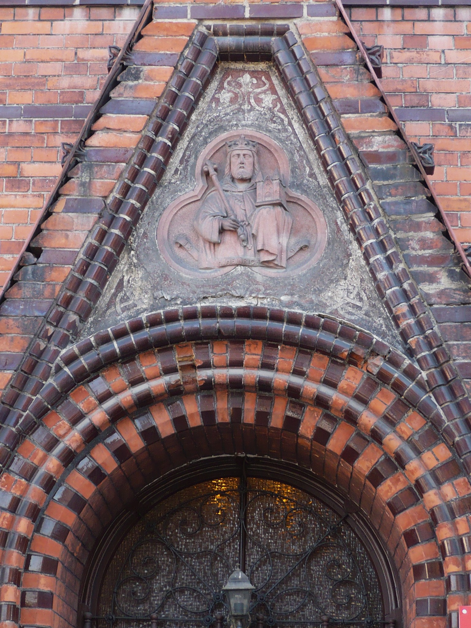 Nowa Ruda, ul. Kolejowa 18 - pierwotnie siedziba policji (do 1945), po II wojnie światowej milicji, UB, obecnie MOPS, 1892